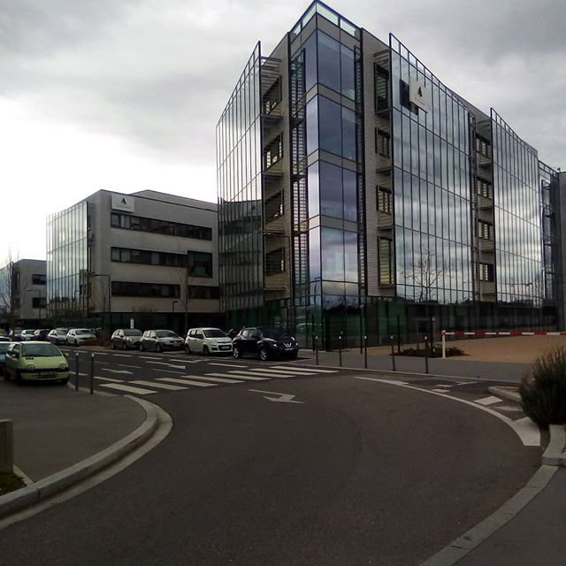 Siège d'Adecco France à Villeurbanne, dans le quartier du Carré de Soie.